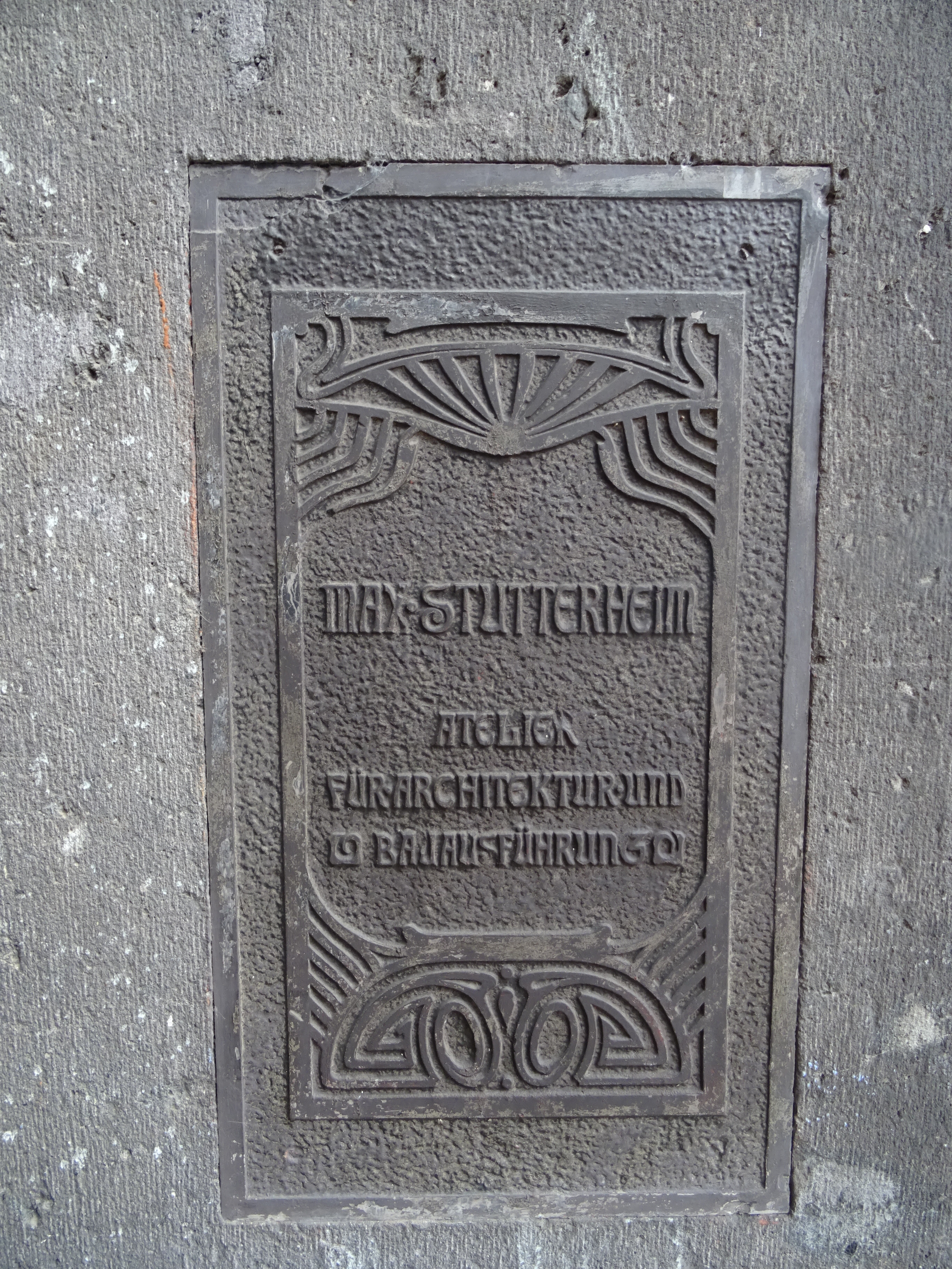 Berlin-Oberschöneweide, denkmalgeschütztes Wohnhaus Helmholtzstr. 5, Firmenschild von Max Stutterheim